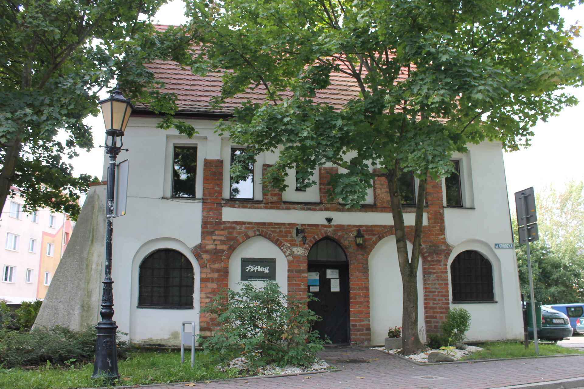 Dom Kata, XV/XVI, XVII, XX Koszalin, ul. Grodzka 3. Kamienica gotycka z XVw.